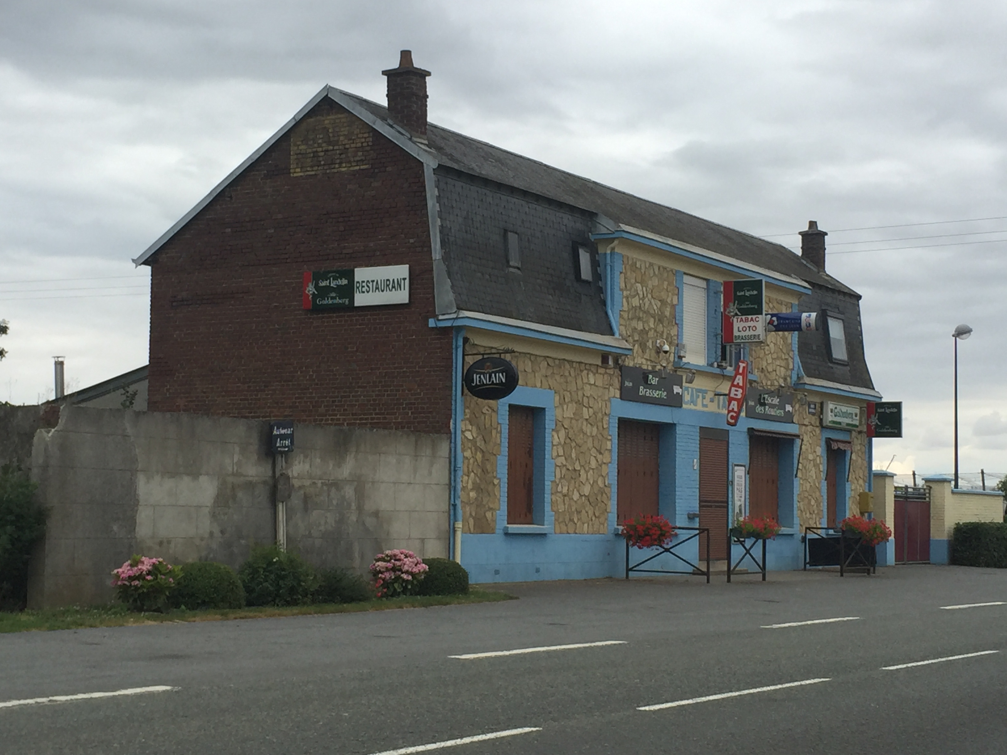 Een restaurant aan de voormalige Route Nationale 17 in Frankrijk